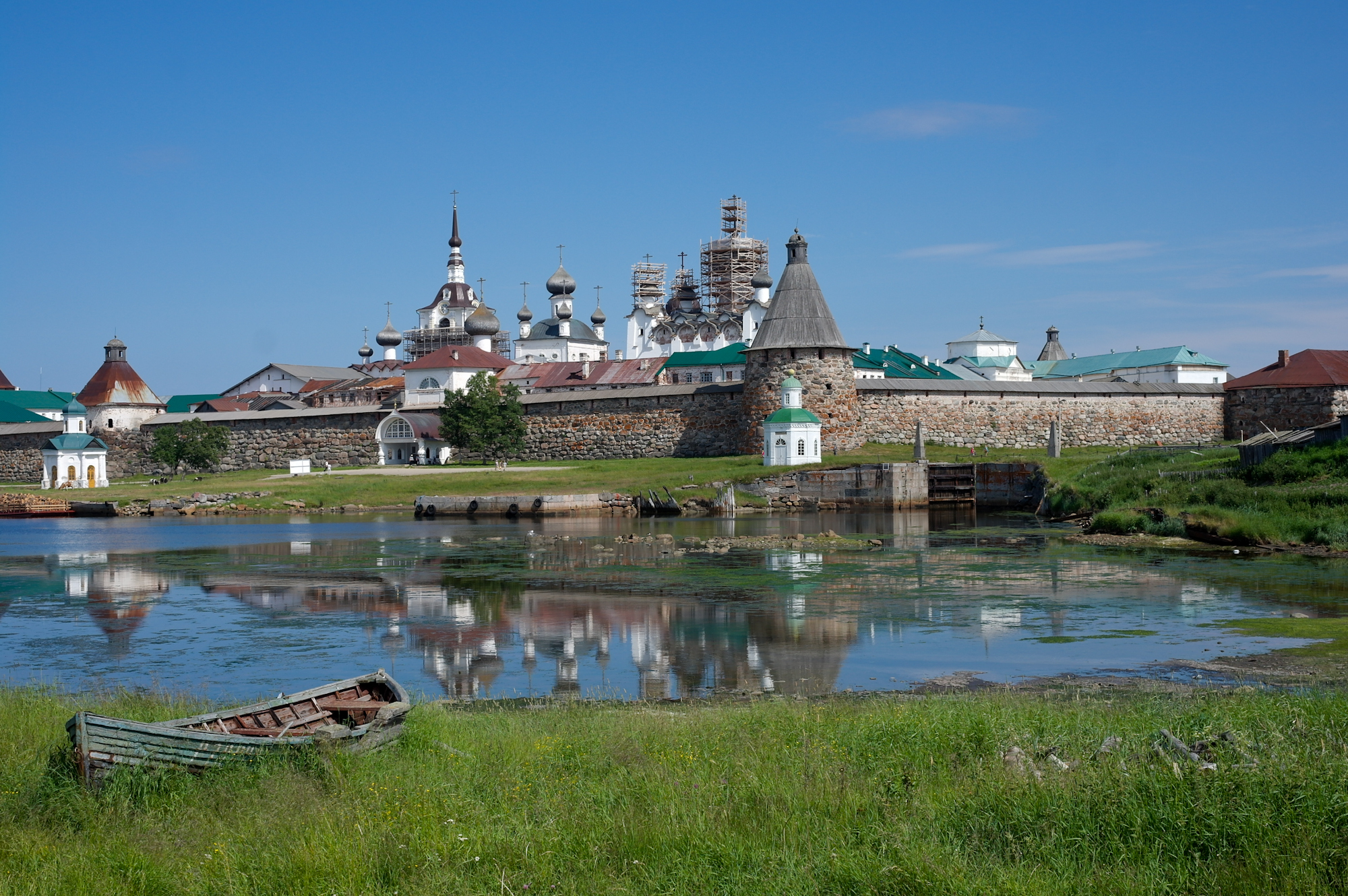 Вид на Соловецкий монастырь с Сельдяного мыса: Святые ворота между Успенской и Прядильной башнями; справа ворота монастырского дока).